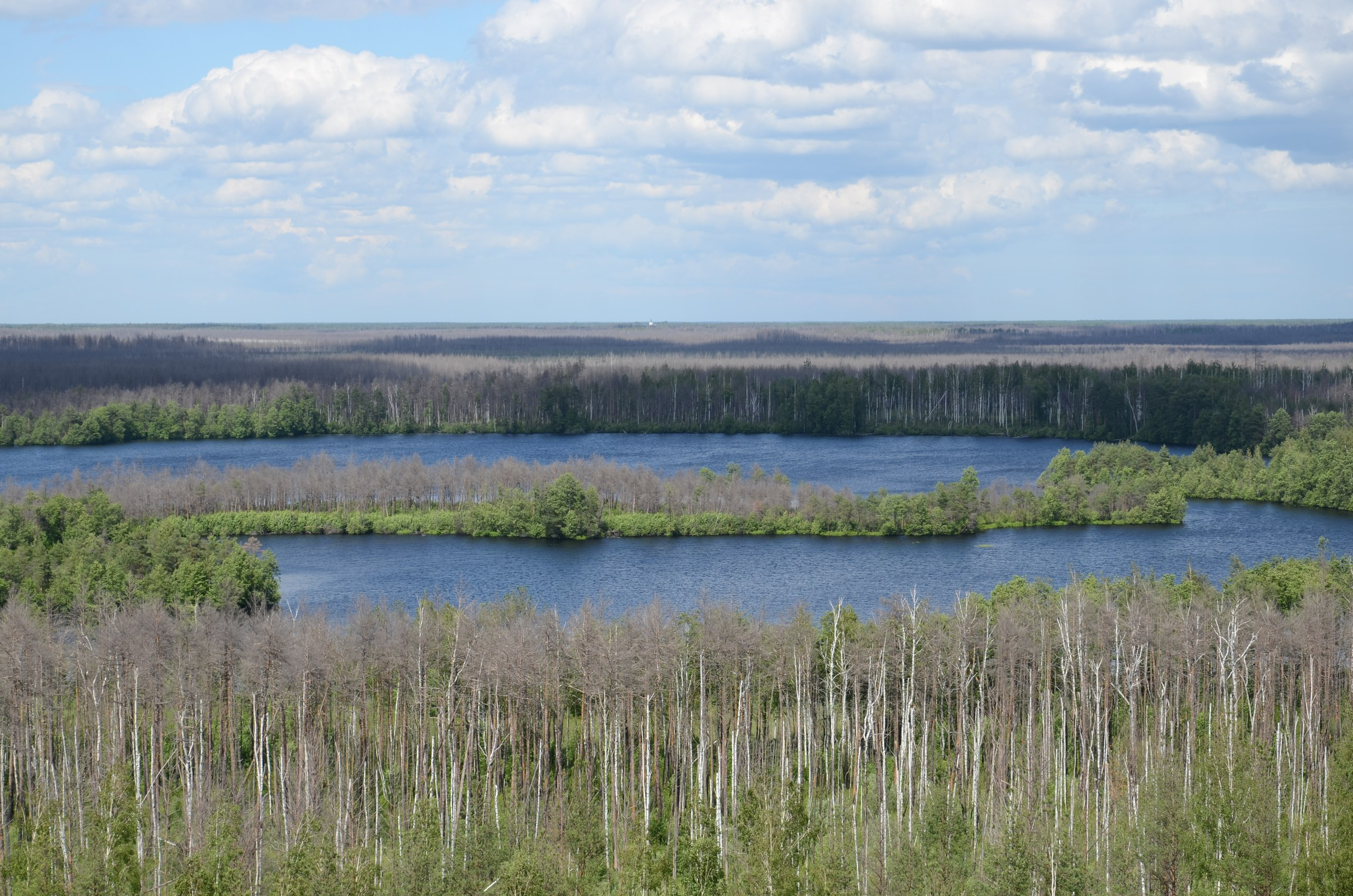 Керженский заповедник, Семёновский район This image is related to the protected area of Russia number 5200494